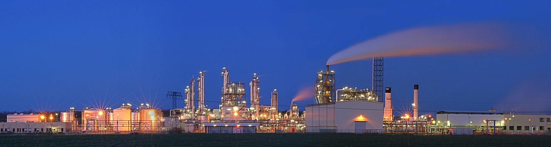 Industrieanlage Lippendorf bei Böhlen, südlich von Leipzig – Panorama aus drei Querformaten, je 6 Aufnahmen als Belichtungsreihe, DRI-Bearbeitung